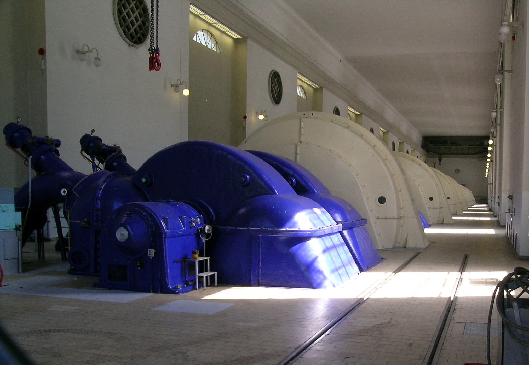 Nore I. Nore og Uvdal, Buskerud, Norway.